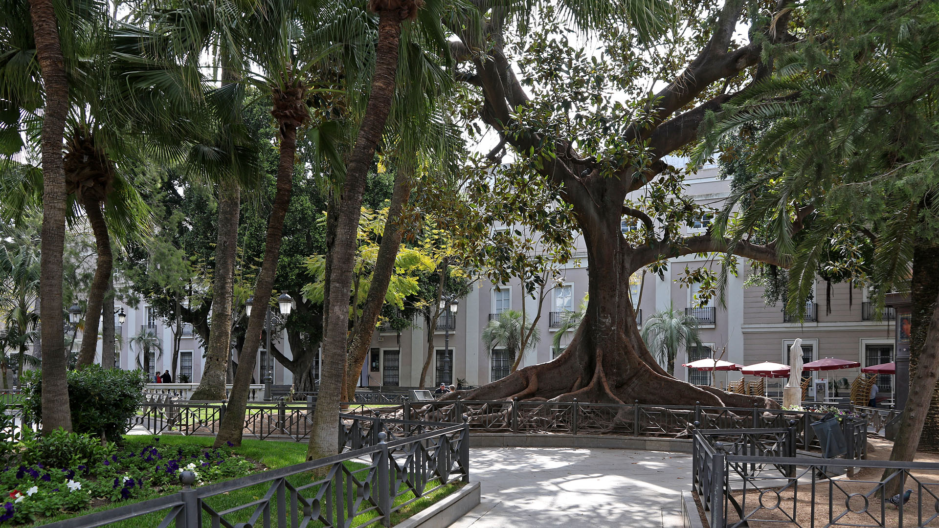 Spain - Cadiz: Plaza de Mina